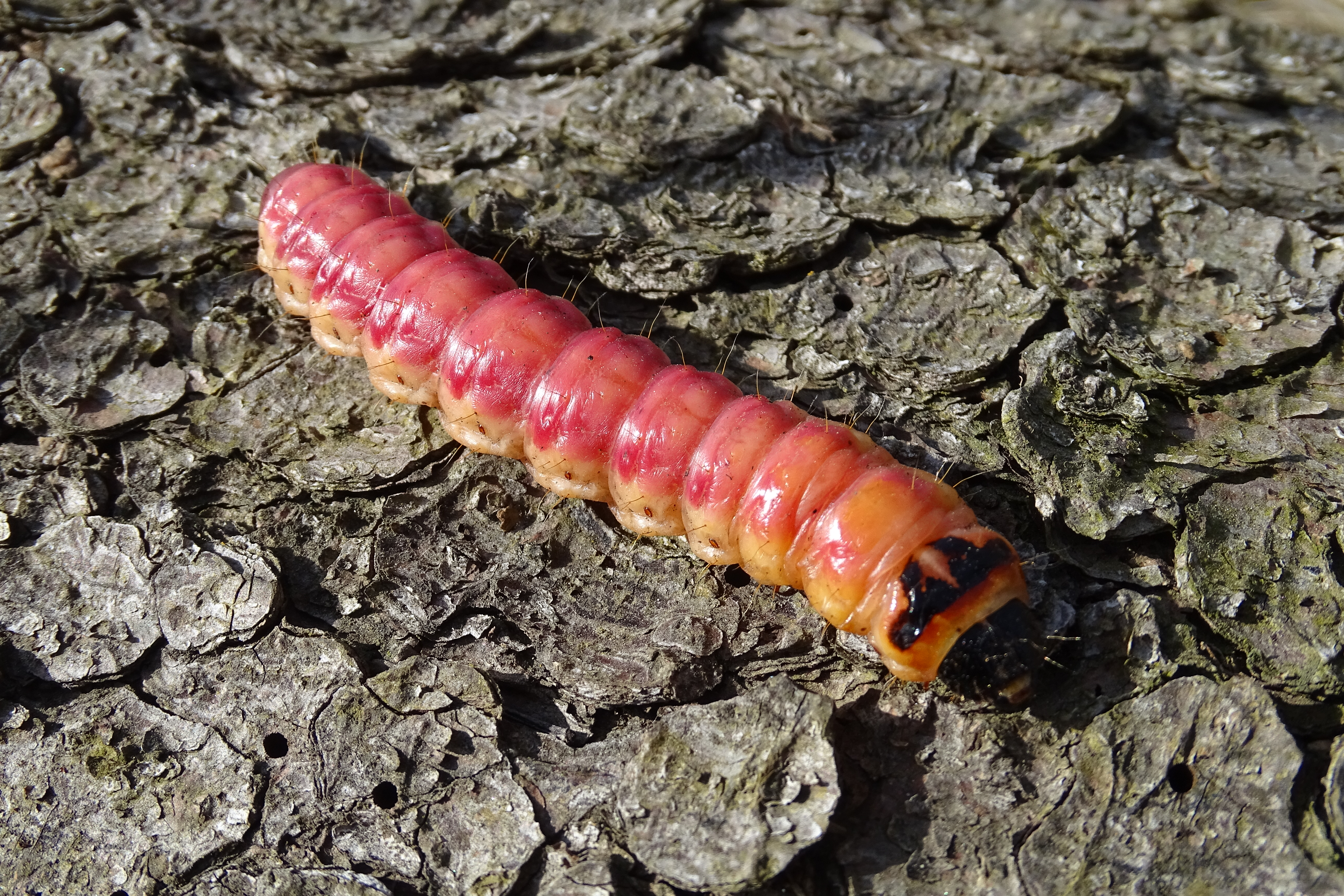 housenka